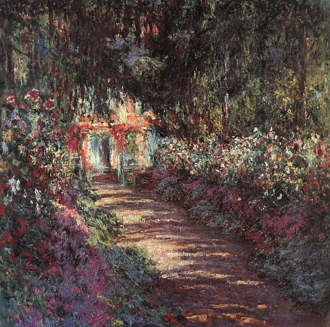 Клод Оскар Моне: The Garden in Flower (1900)